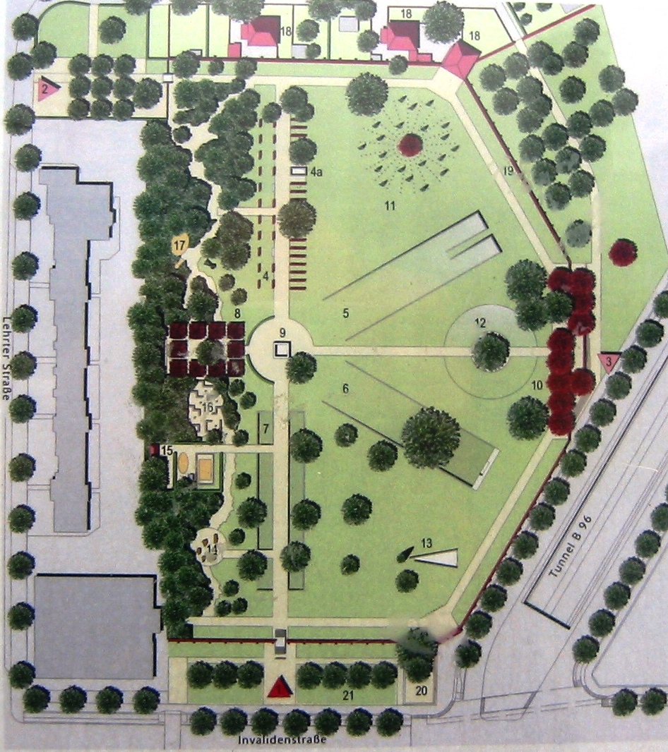 Entwurf des Geschichtsparks Ehemaliges Zellengefängnis Moabit auf dem Gelände des ehemaligen Zellengefängnis Lehrter Straße in Berlin-Moabit (Mitte), aufgenommen auf einer Informationssäule an der Invalidenstraße